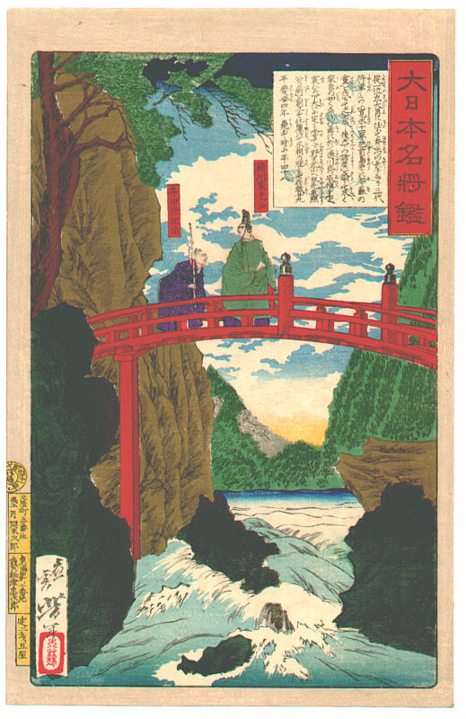 Tokugawa Iemitsu and Ii Naotaka in Nikko